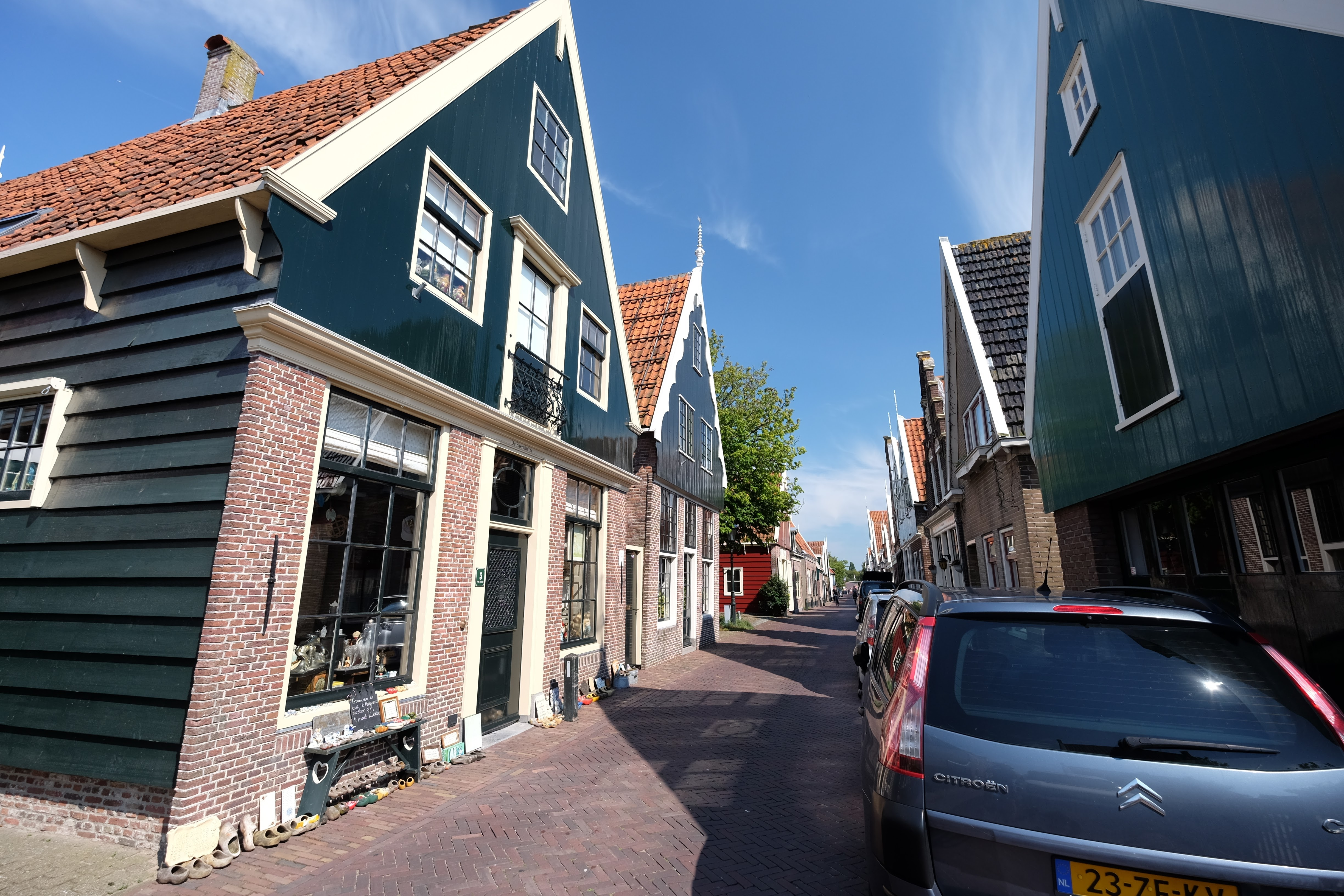 1483 De Rijp, Netherlands